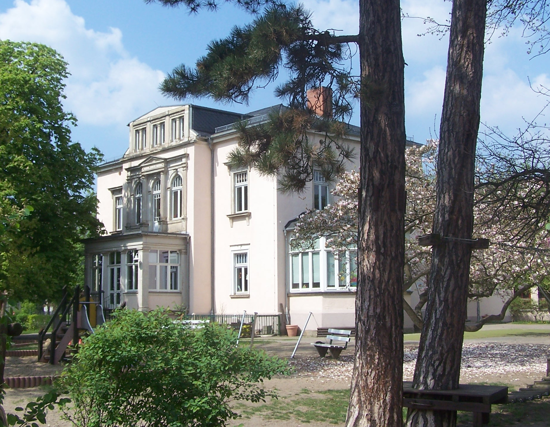 Gohliser Straße 8 in Radebeul, Kindertagesstätte "Zur Bimmelbahn"